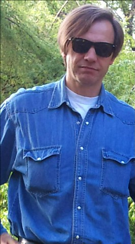 Jacek Wroński